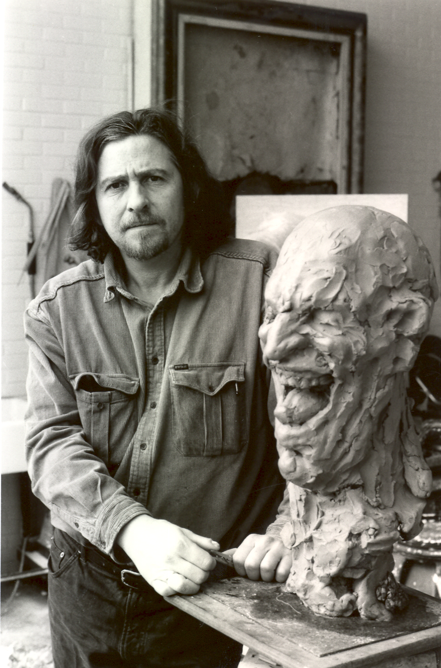 Roland Rens in zijn atelier met "De Lach" in klei. (work in progress) Het beeld staat in brons aan de ingang van de culturele site "Het Gasthuis" in Aarschot.